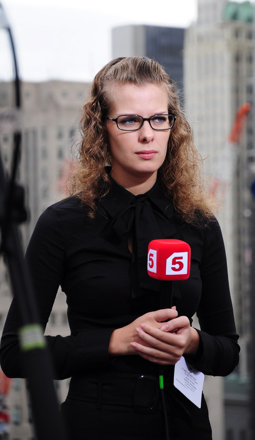 Российский журналист Екатерина Иванова